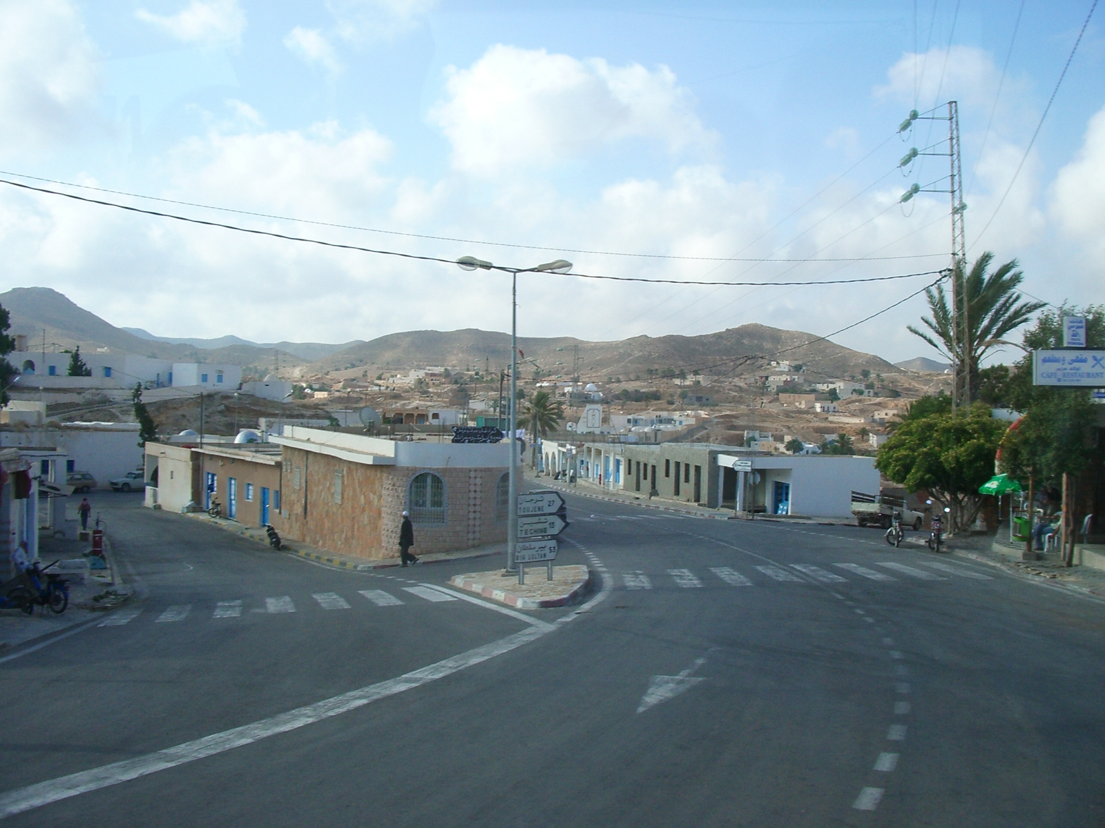 Matmata